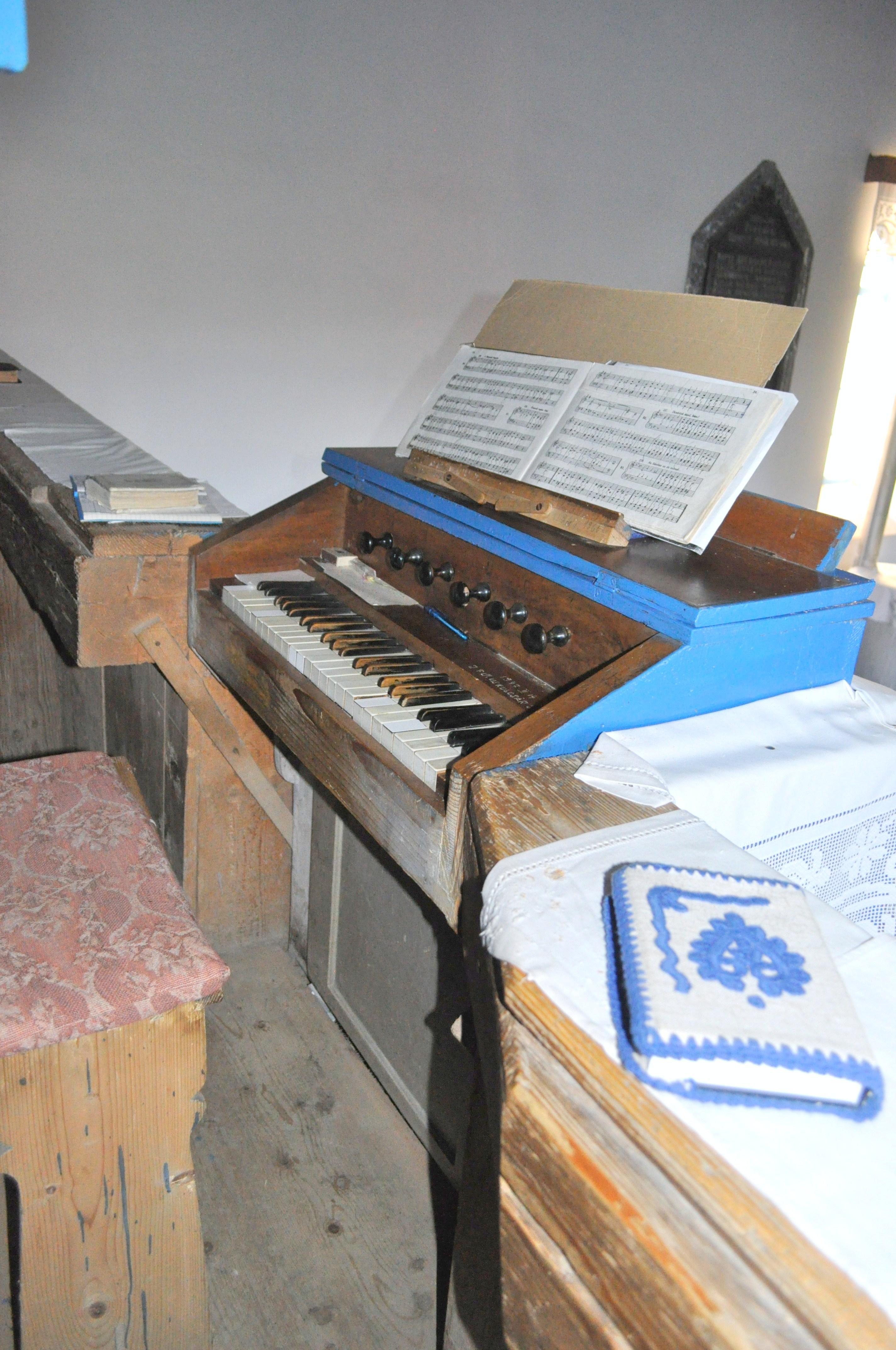 Biserica reformată, sat DUMBRAVA; comuna CĂPUŞU MARE, județul Cluj